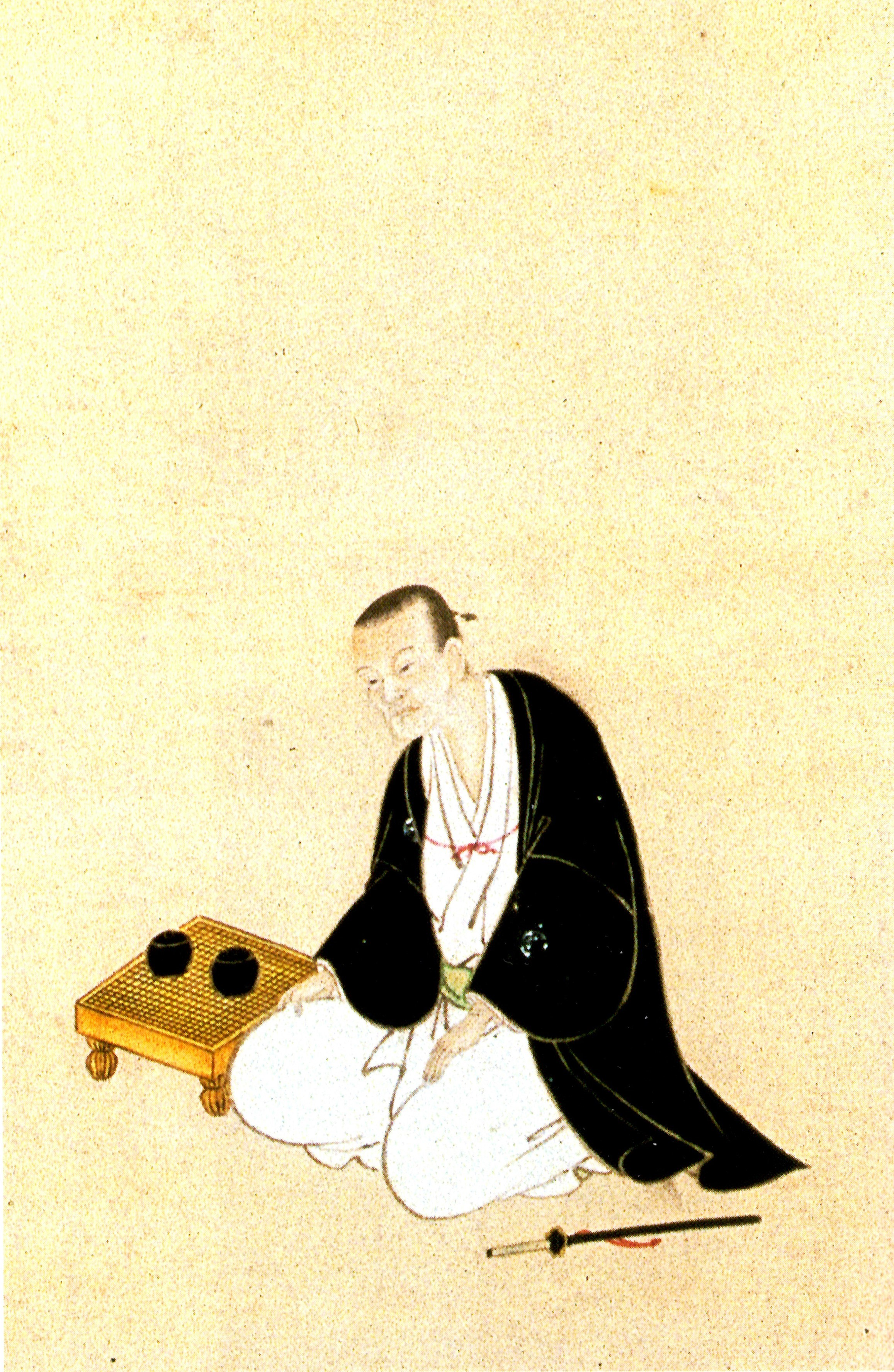 島津久理の肖像。